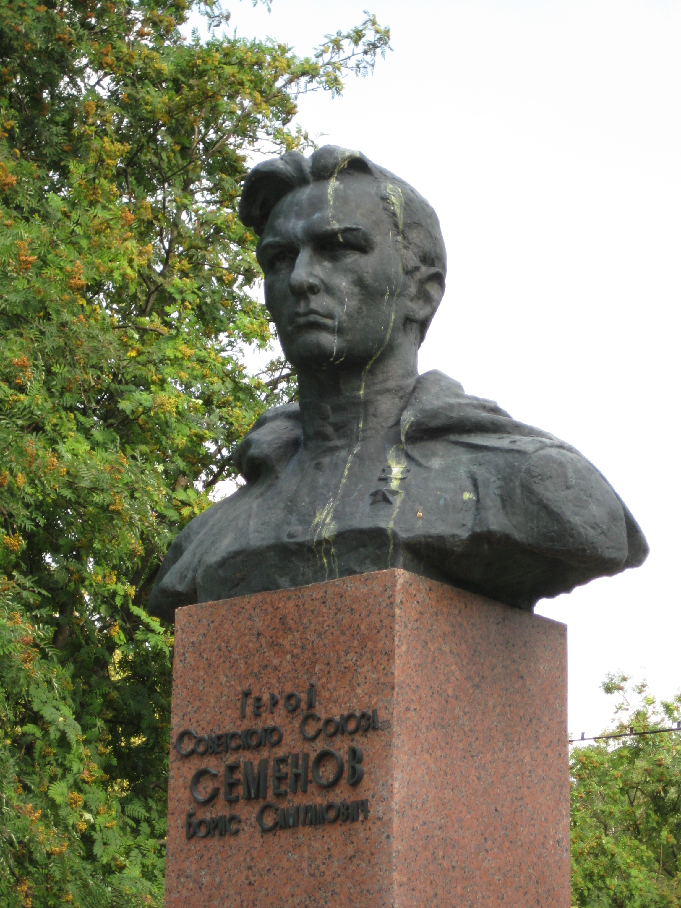 Памятник Герою Советского Союза Семёнову Борису Самуиловичу в с. Саверцы (Украина) за освобождение которого он погиб.